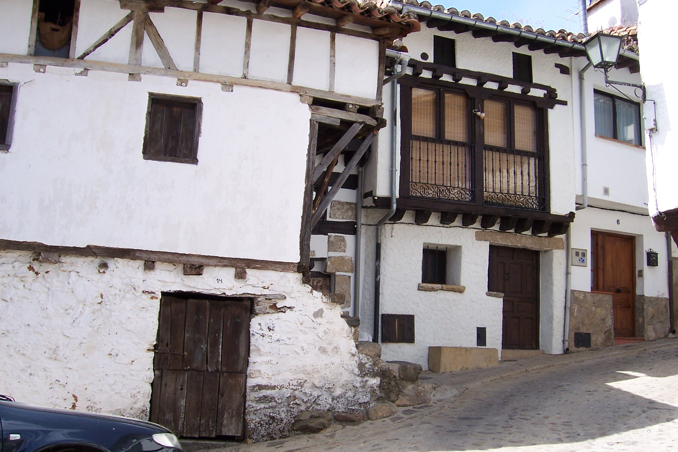 Una calle en el pueblo de Guisando, Ávila, España.